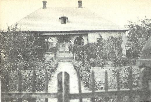 Будинок пастора села Андріївки, Б-Дністровський район, Одеська область